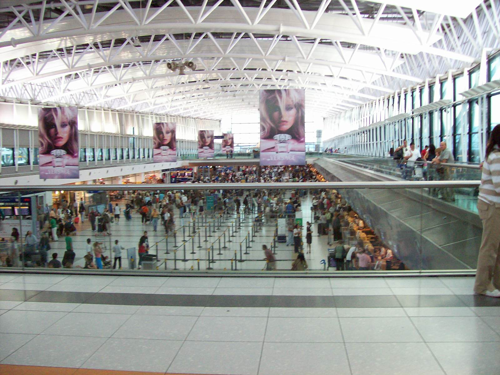 Ministro Pistarini International Airport, Terminal A. Ezeiza, Buenos Aires, Argentina